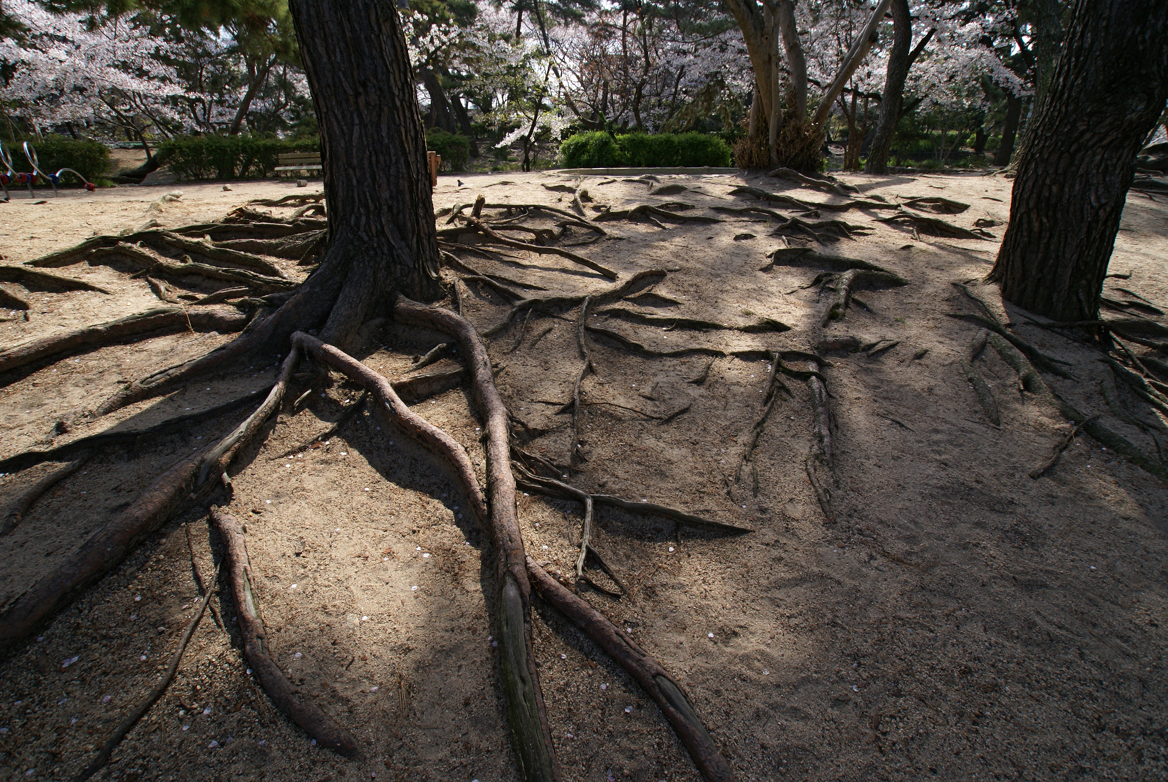 Shukugawa Park in Nishinomiya, Hyogo prefecture, Japan